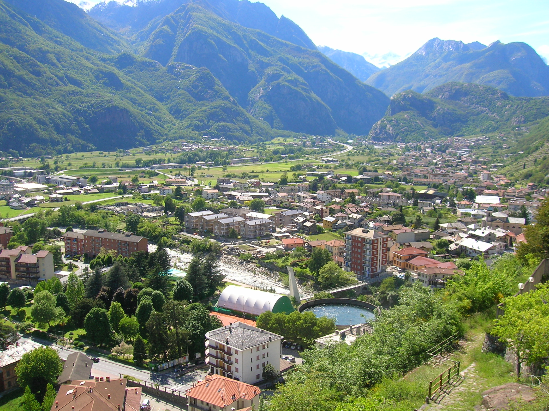 Panorama di Pont Saint Martin, Valle d'Aosta, Italia.